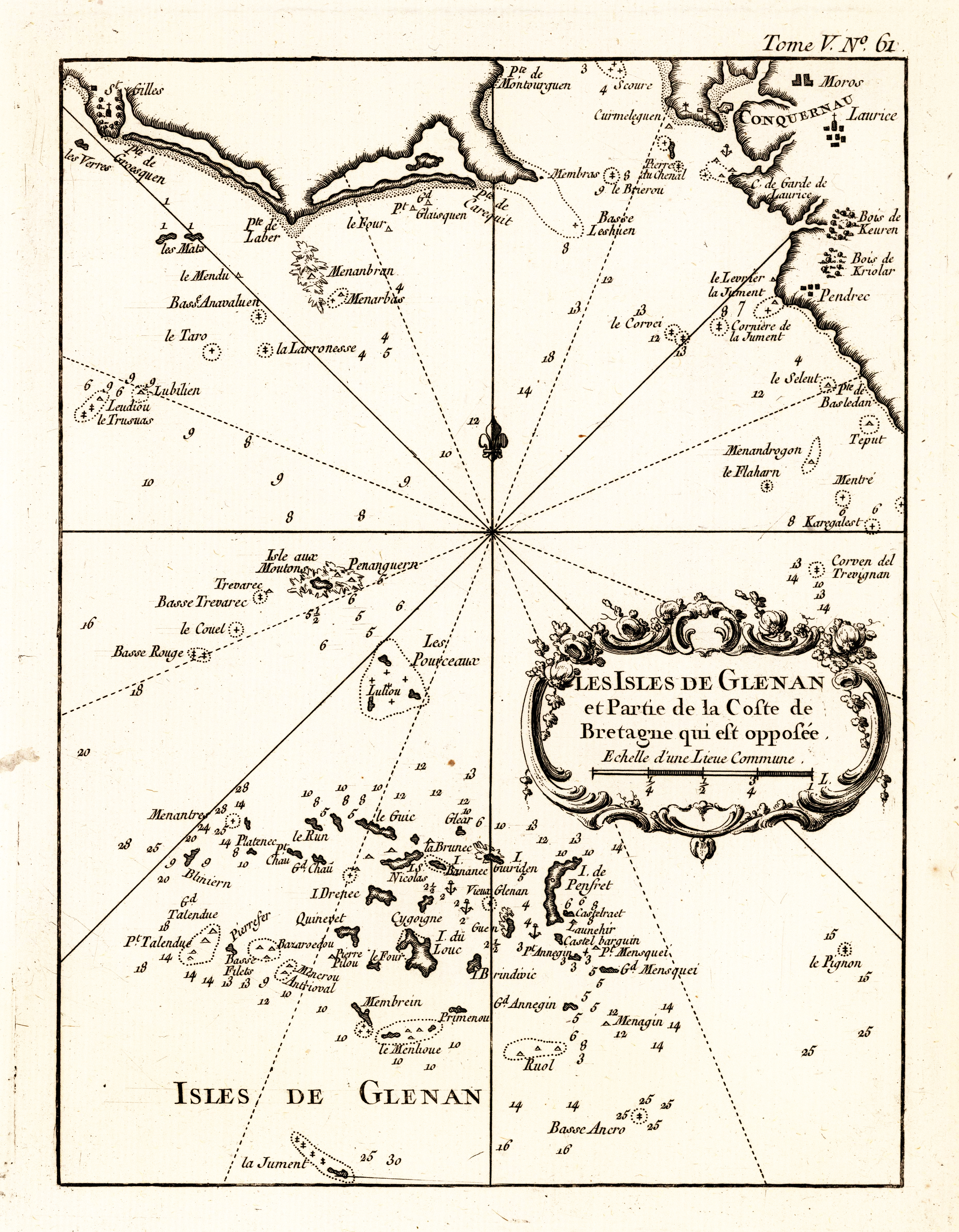 Carte extraite du "Petit Atlas Maritime" (1764) de Jacques-Nicolas Bellin (1703-1772) Collection particulière